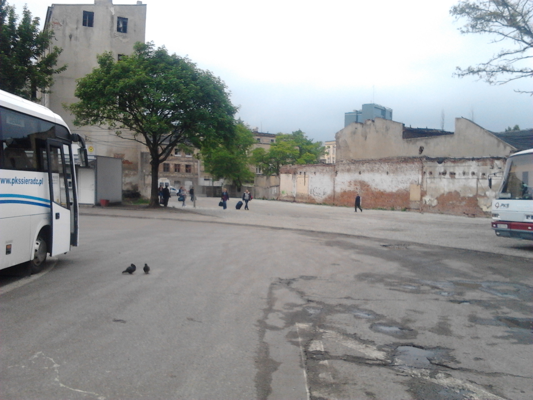 Wyjazd z dworca utworzony partyzancko przez jego zarządcę po zablokowaniu dojazdu przez miasto